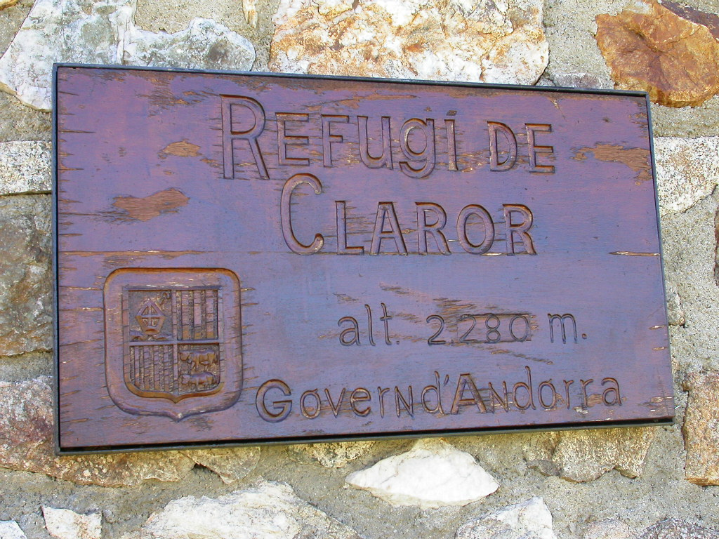 Refuges Andorre